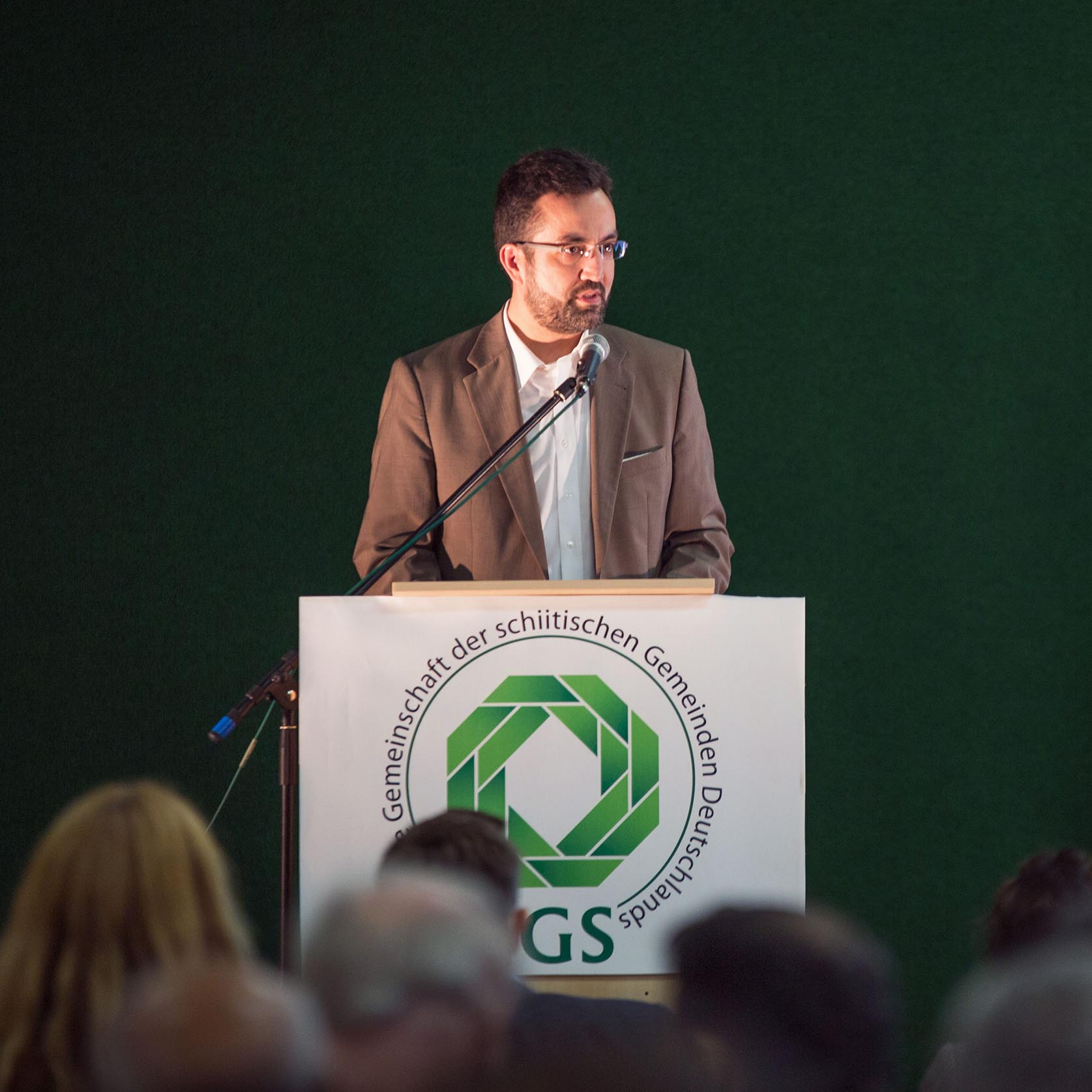 Ünal Kaymakci